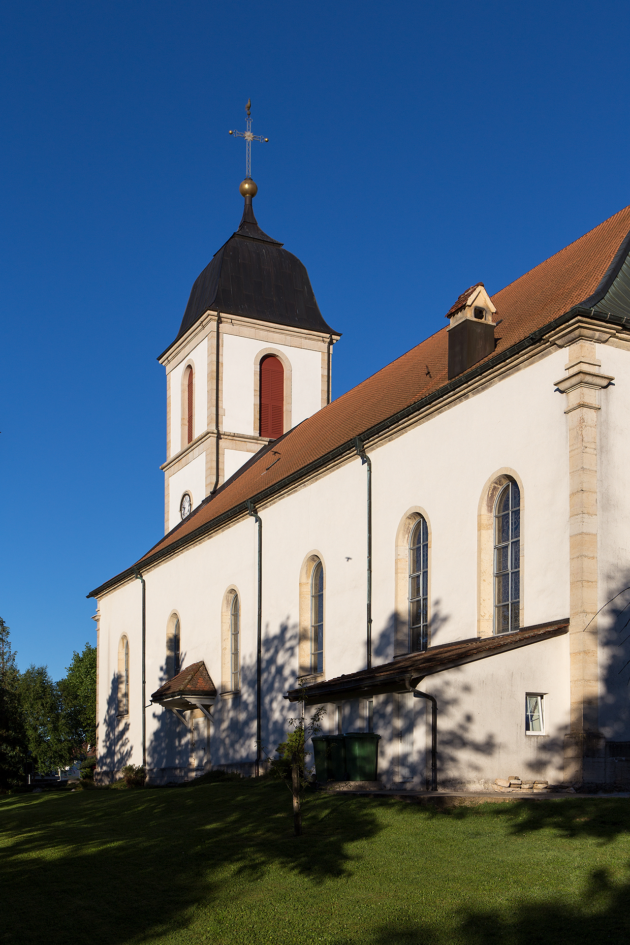 Eglise Sainte Foy in Les Bois (JU)